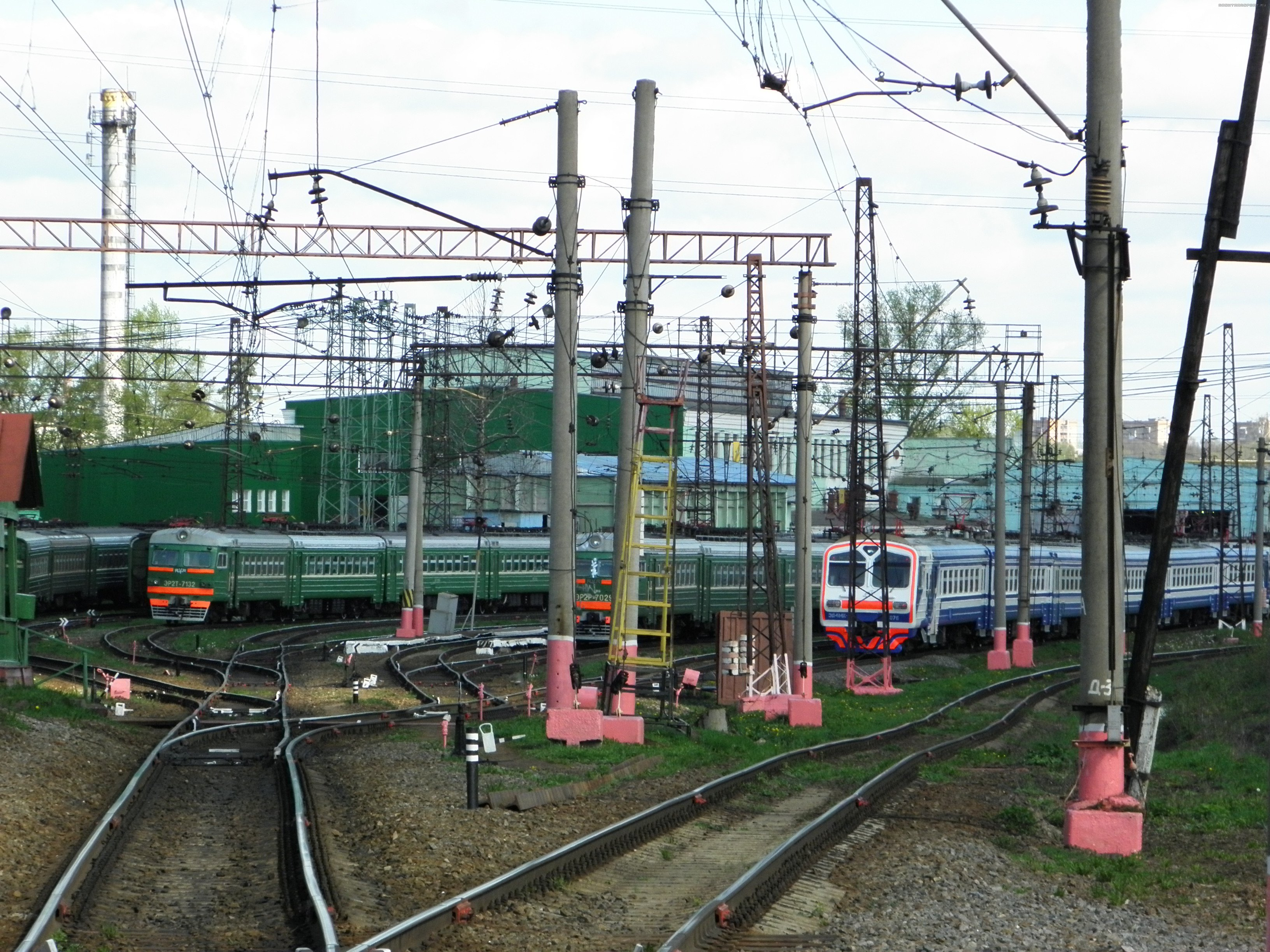 Моторвагонное депо Лобня. Слева направо электропоезда ЭР2Т-7132, ЭР2Р-7029 и ЭД4МК-0076.